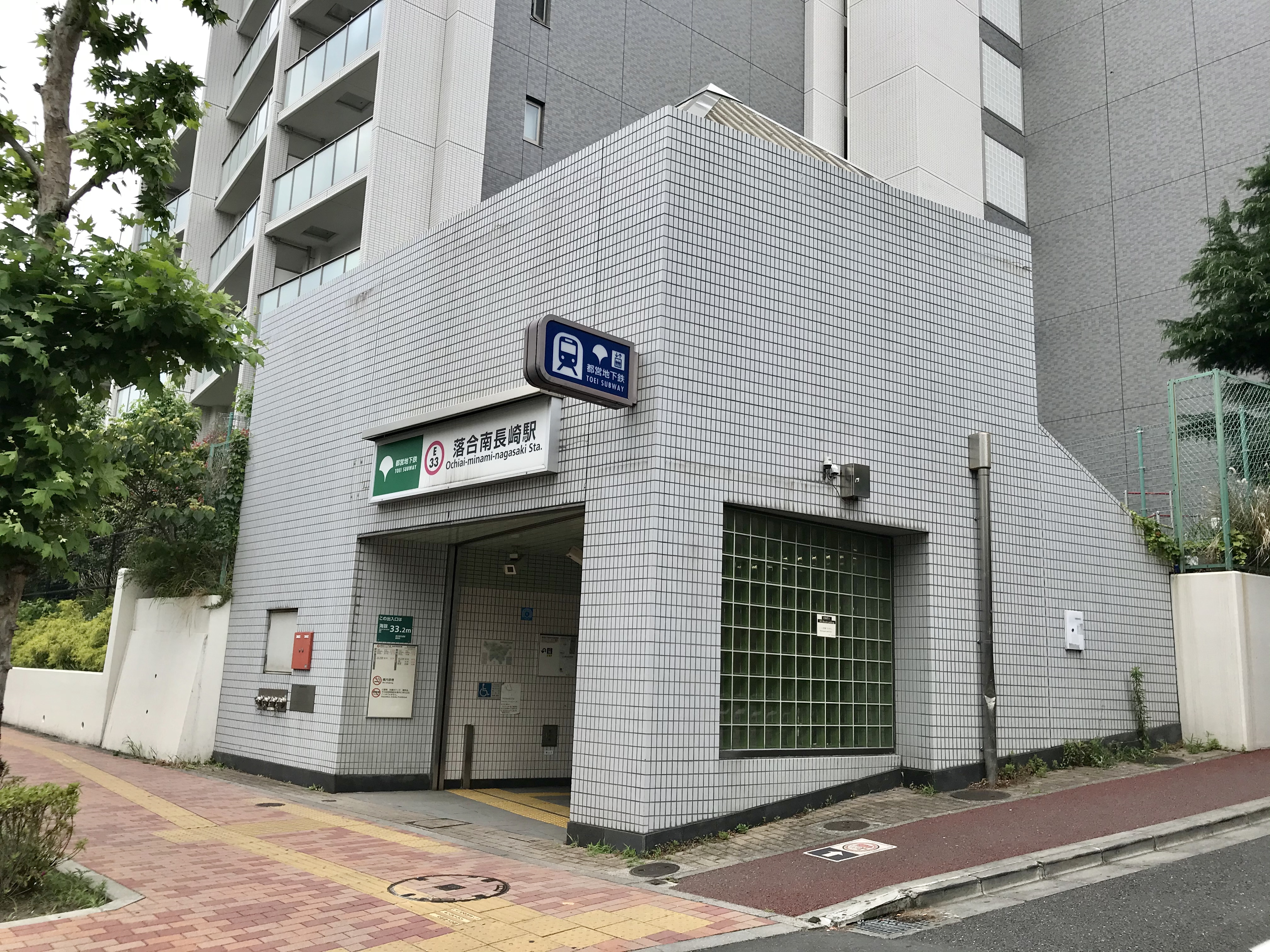 都営地下鉄大江戸線落合南長崎駅A2番出入口